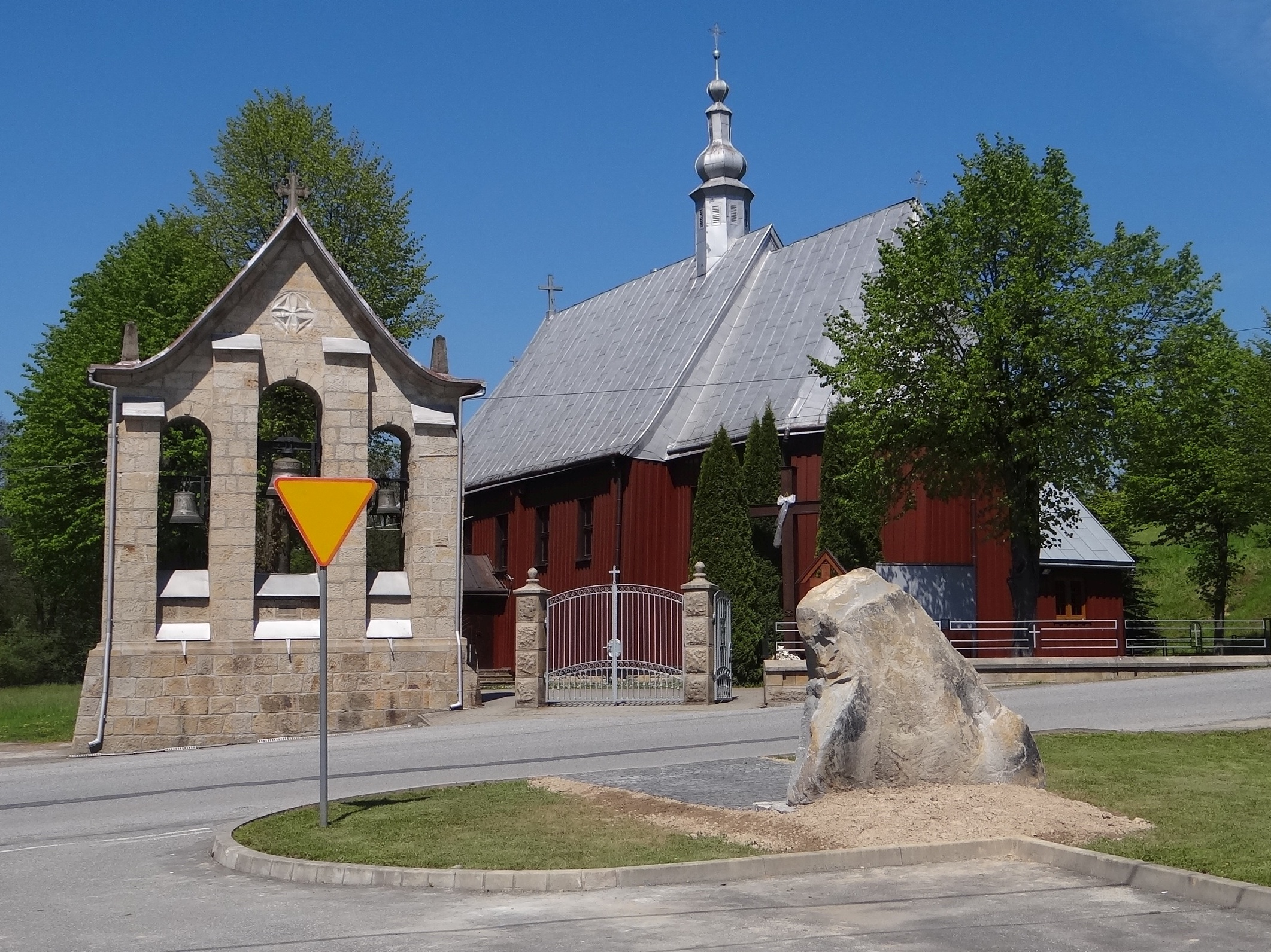 Kościół w Żurowej